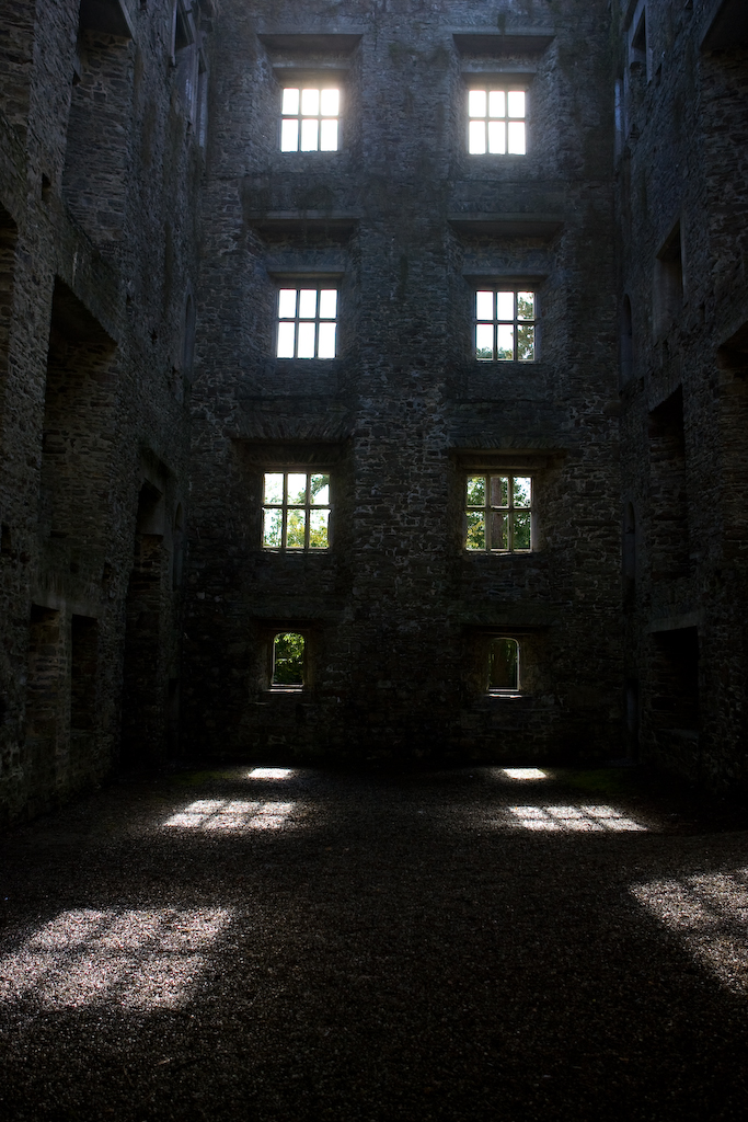 Kanturk Castle